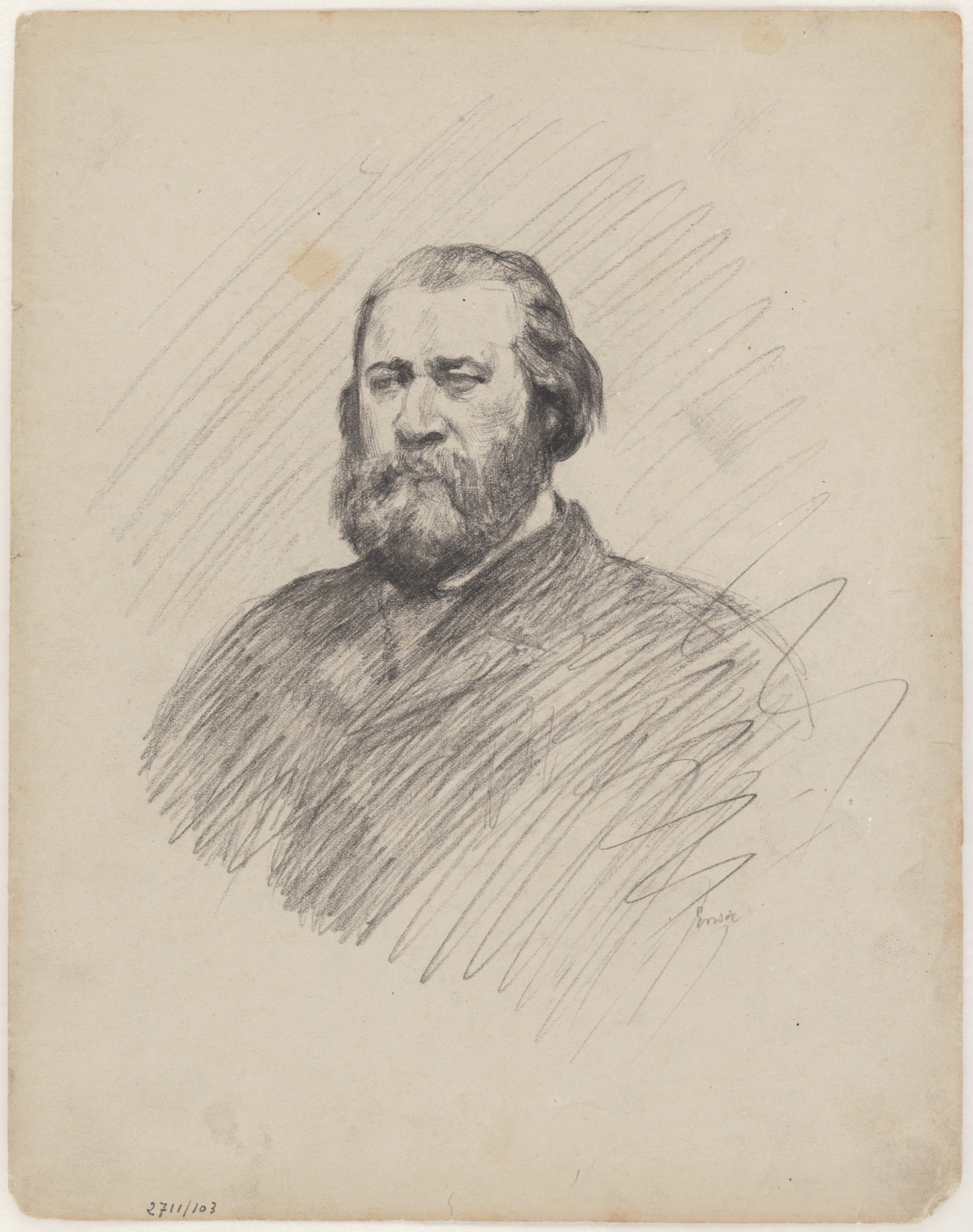 De schilder Jean-François Millet (1814-1875), (James Ensor, circa 1880-1890); collection: Koninklijk Museum voor Schone Kunsten Antwerpen